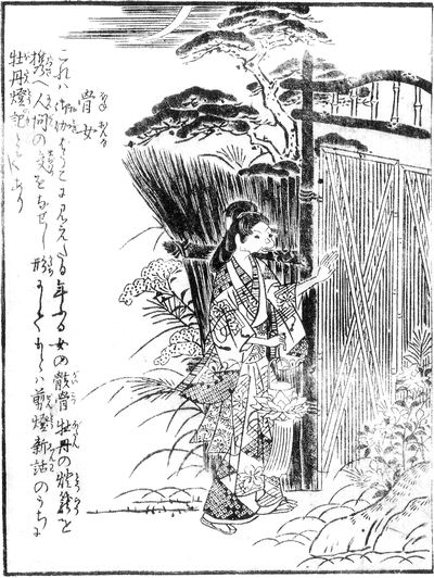 Hone-onna (骨女, a skeleton woman) from the Konjaku Gazu Zoku Hyakki (今昔画図続百鬼)